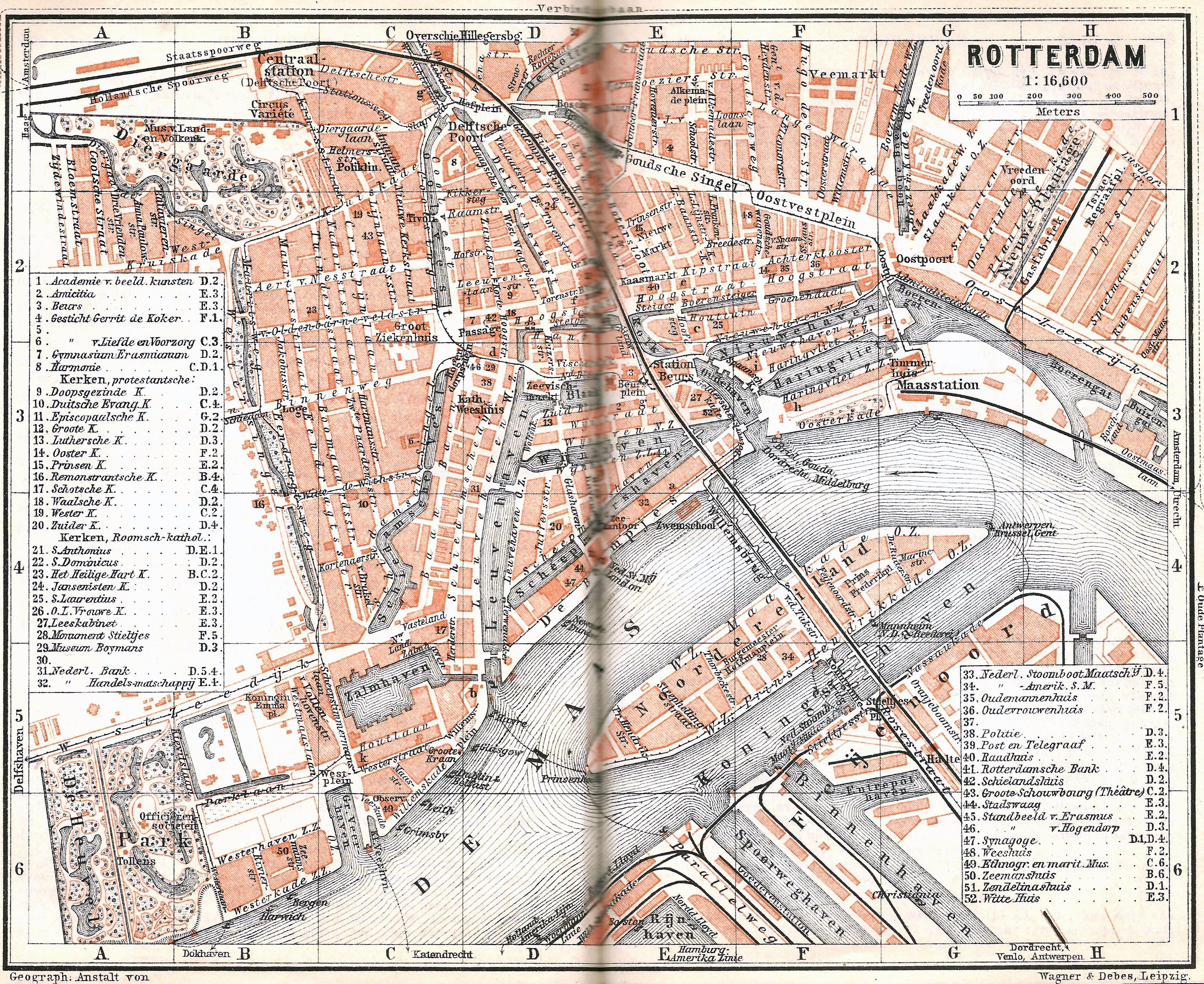 Kaart van Rotterdam in 1905. Er reden nog grotendeels paardentrams. Alleen lijn 1 was toen elektrisch. (Honingerdijk – Beurs – Park) Op de kaart (O-W): Oost Zeedijk, Admiraliteitskade, Nieuwe Haven N.Z., Beursplein, Schiedamse singel, Witte de Withstraat, Eendrachtweg, Scheepvaarttimmermanstraat, Parklaan